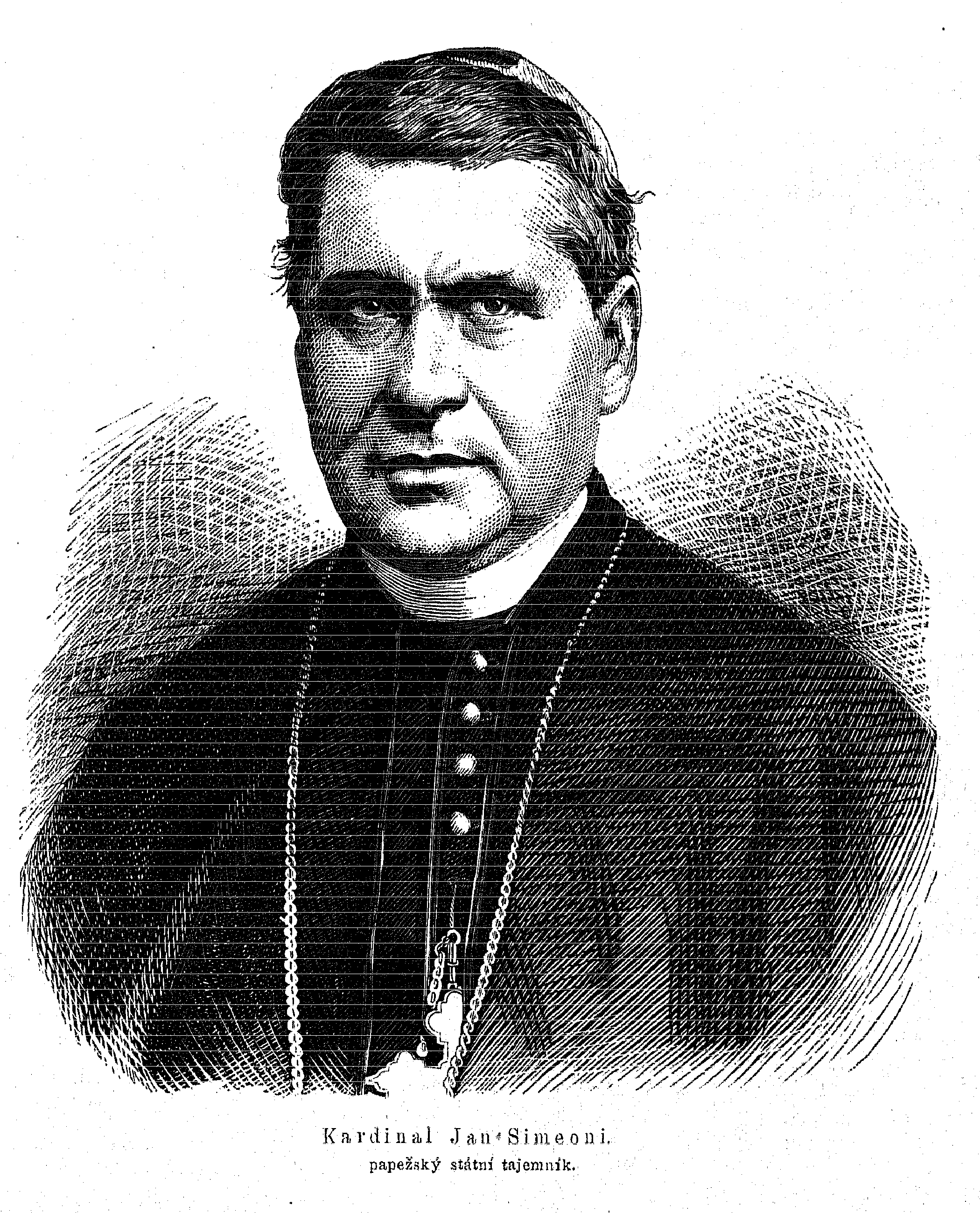 Portrait of Cardinal Giovanni Simeoni (1816 -1892)